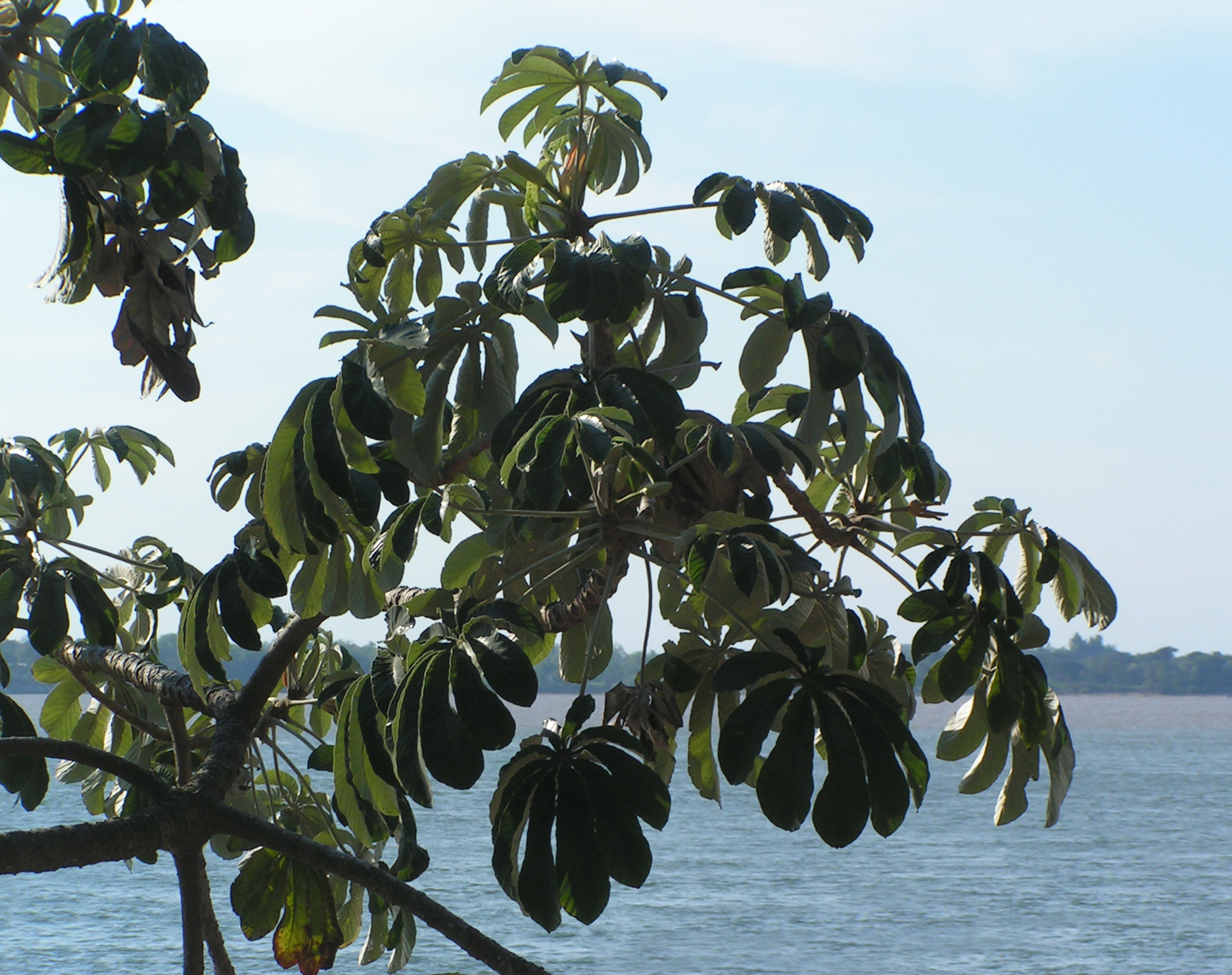 Ambay (Cecropia pachystachya)